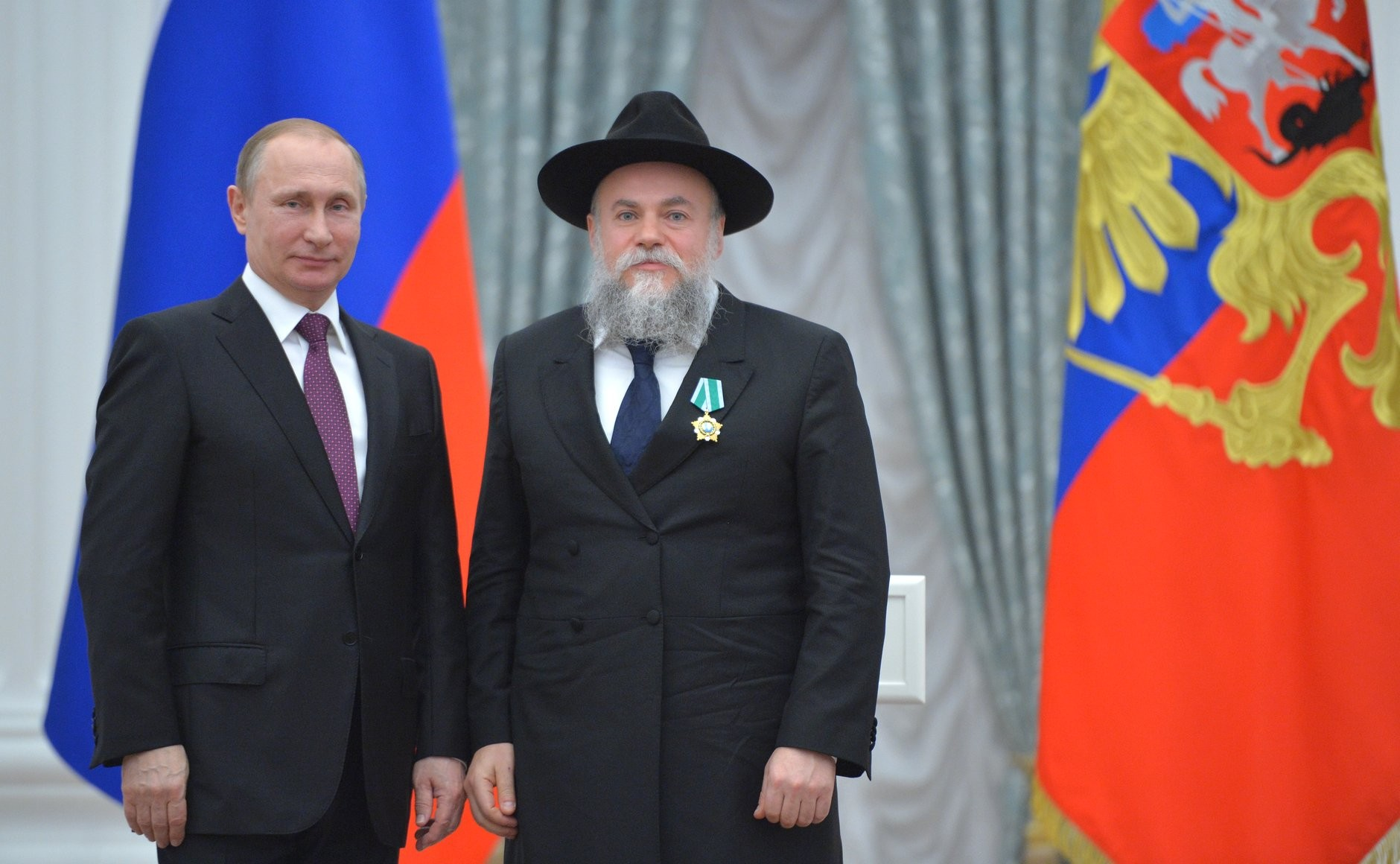 Церемония вручения государственных наград Российской Федерации. Орденом Дружбы награждён президент Федерации еврейских общин России Александр Борода